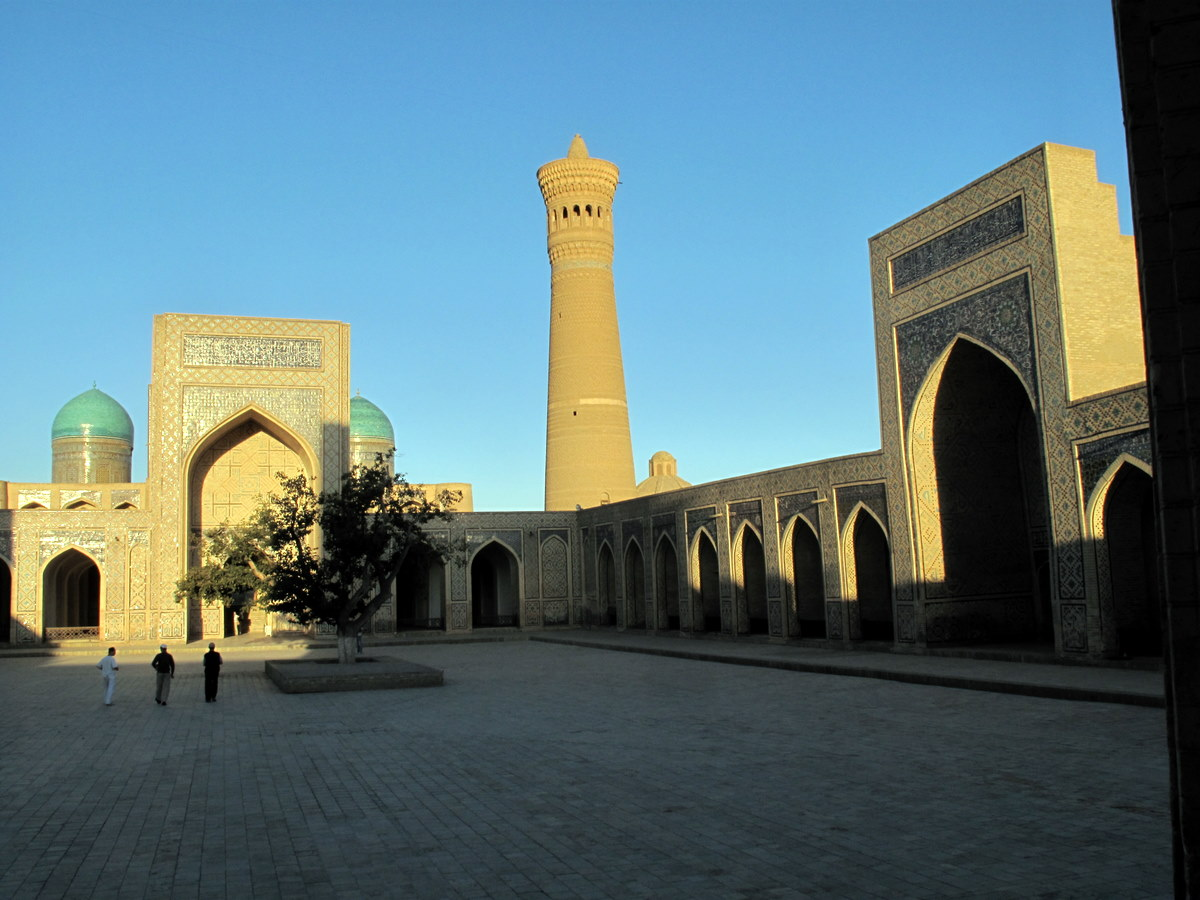 Bukhara Mosque